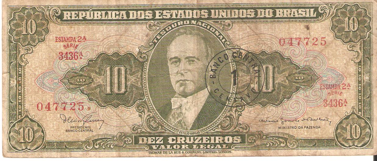 Frente da nota de dez cruzeiros